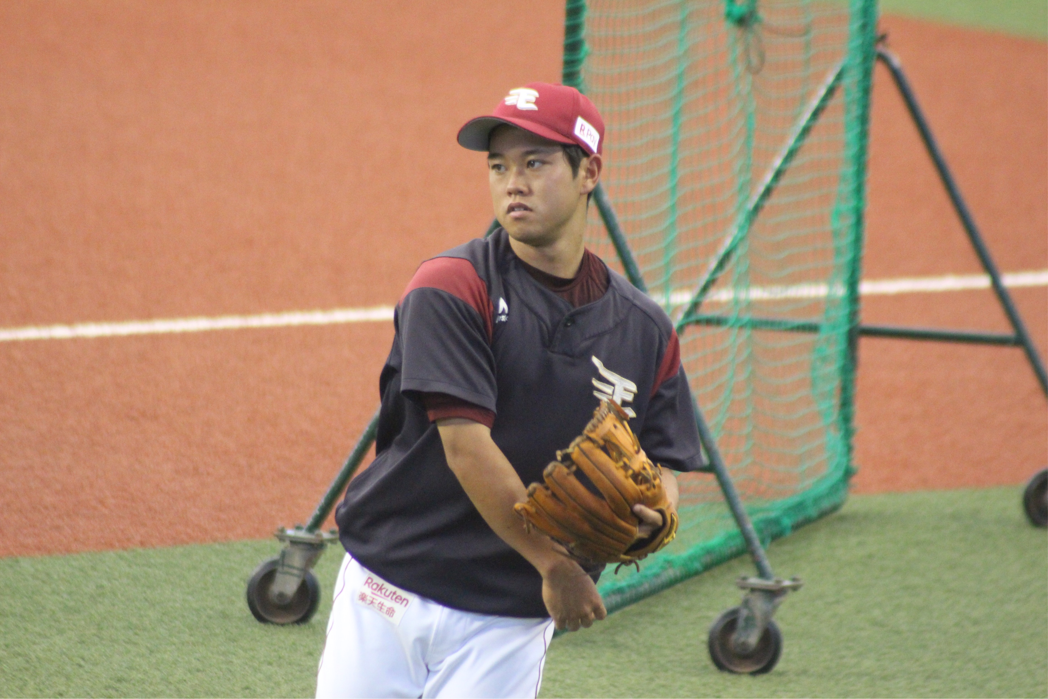 2019年8月6日 メットライフドームにて撮影